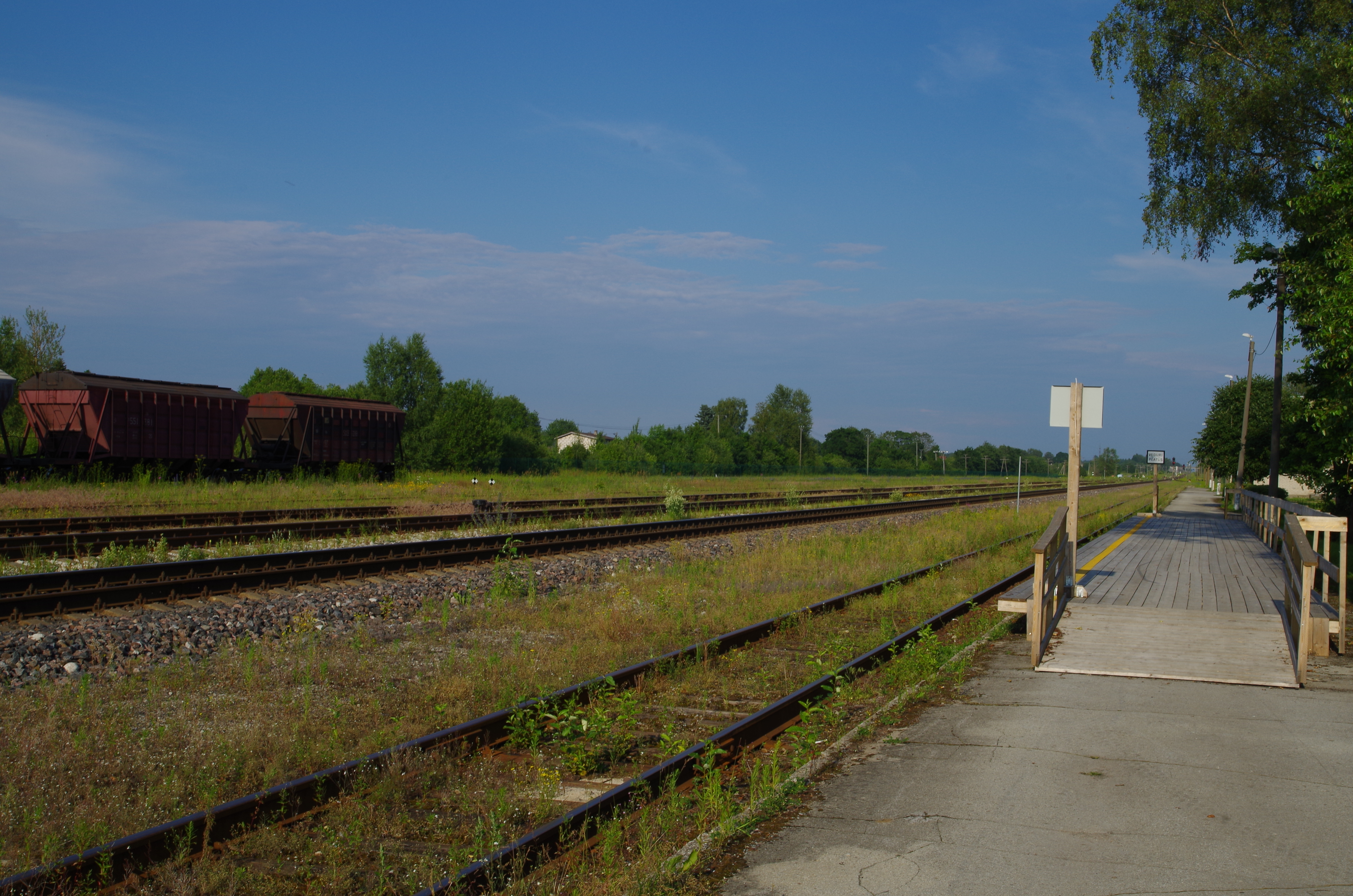 Kohtla raudteejaama perroon